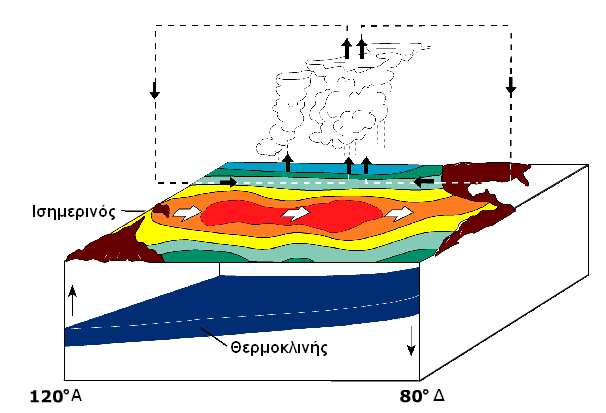 Η κυκλοφορία των υδάτων διαταράσσεται από το φαινόμενο του Ελ Νίνιο. Οι αληγείς άνεμοι αποδυναμώνουν επιτρέποντας το ζεστό νερό να φύγει από τη Δύση, το οποίο παρακρατήθηκε από αυτούς. H κλίση της θερμοκλινούς μειώνεται στα ανατολικά. Η κατανομή της θερμοκρασίας στην επιφάνεια του νερού επιτρέπει στην κυκλοφορία Walker να εμφανιστεί πιο ανατολικά διαταράσσοντας το φυσιολογικό πρότυπο καιρικών συνθηκών.